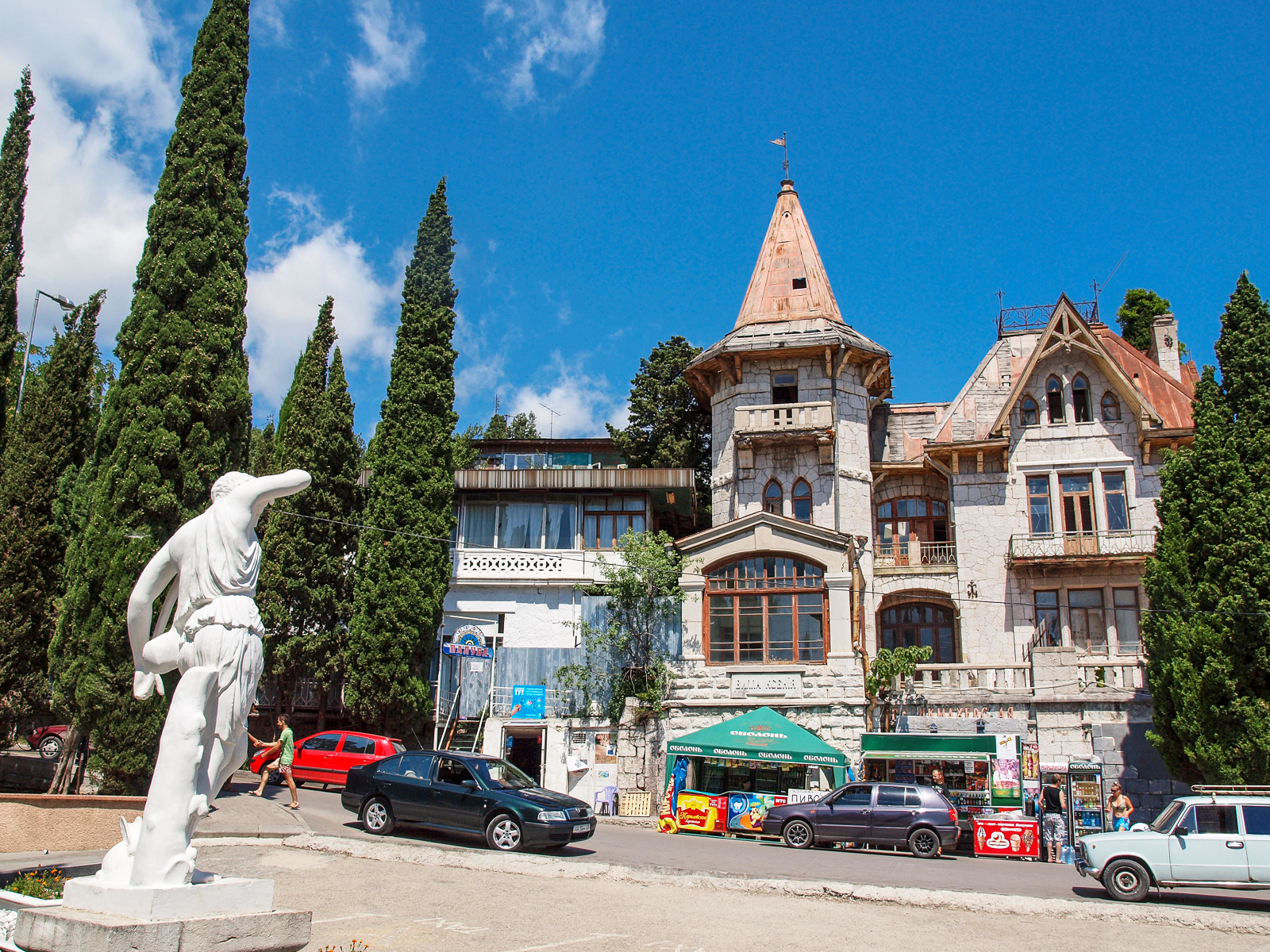 Дача «Ксенія», Сімеїз, вул. Радянська, 64, літер «Б» (корпус № 2), «В», «Г», "Д "